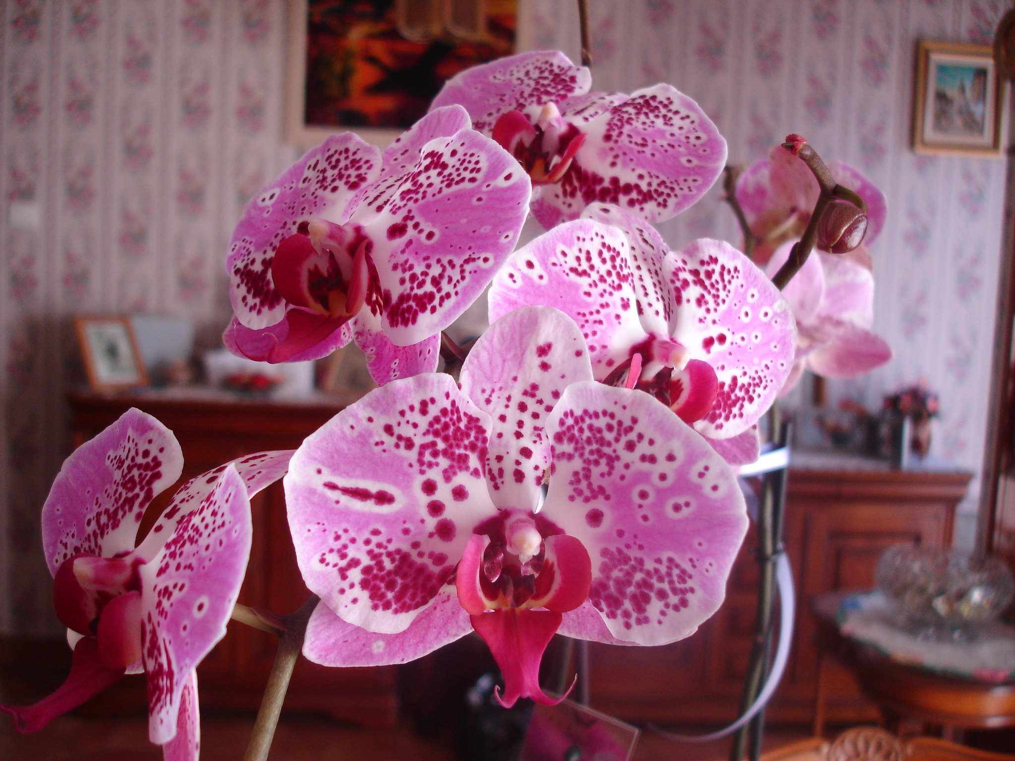 Variété d'orchidée tigrée